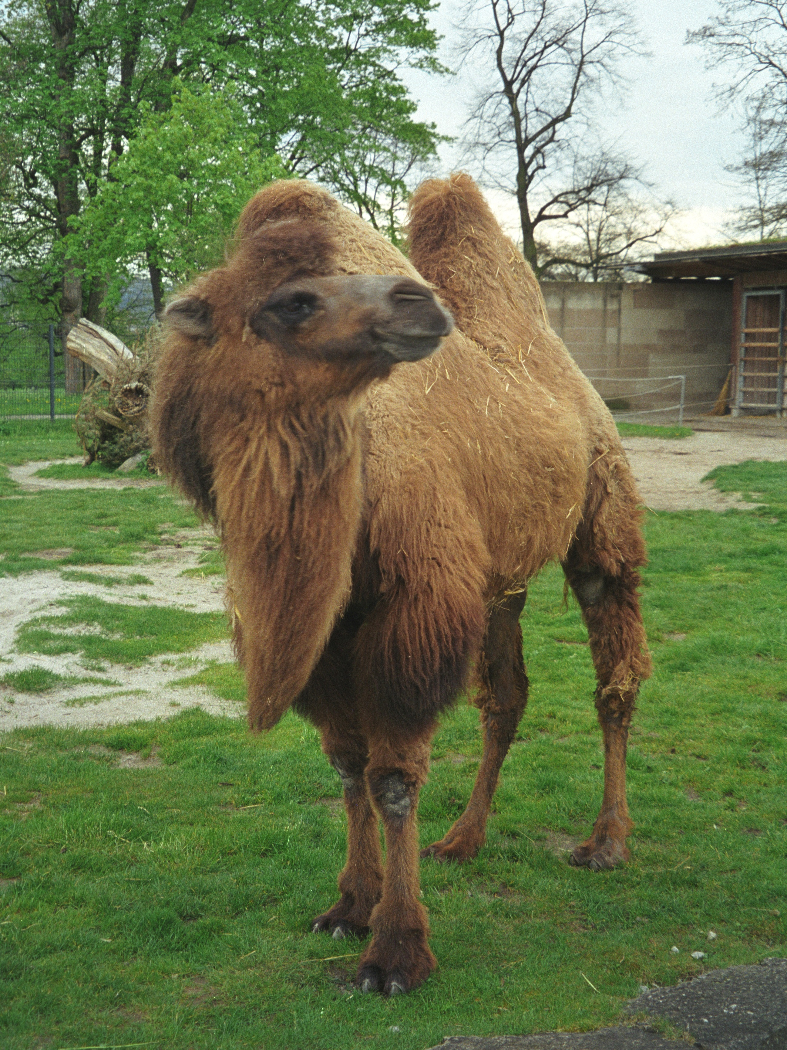 Tier Kamel Wilhelma Stuttgart Deutschland